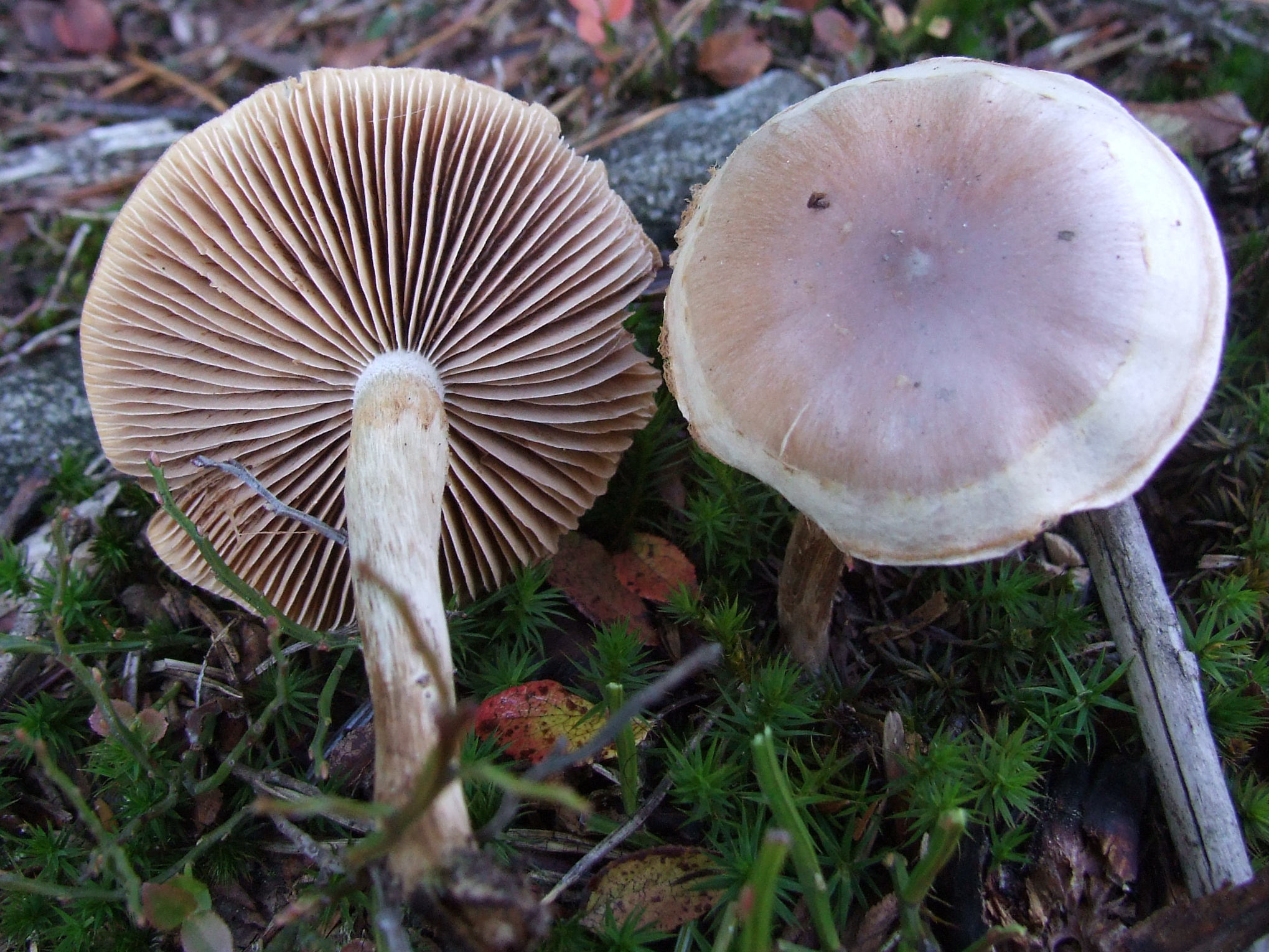 Hebeloma helodes